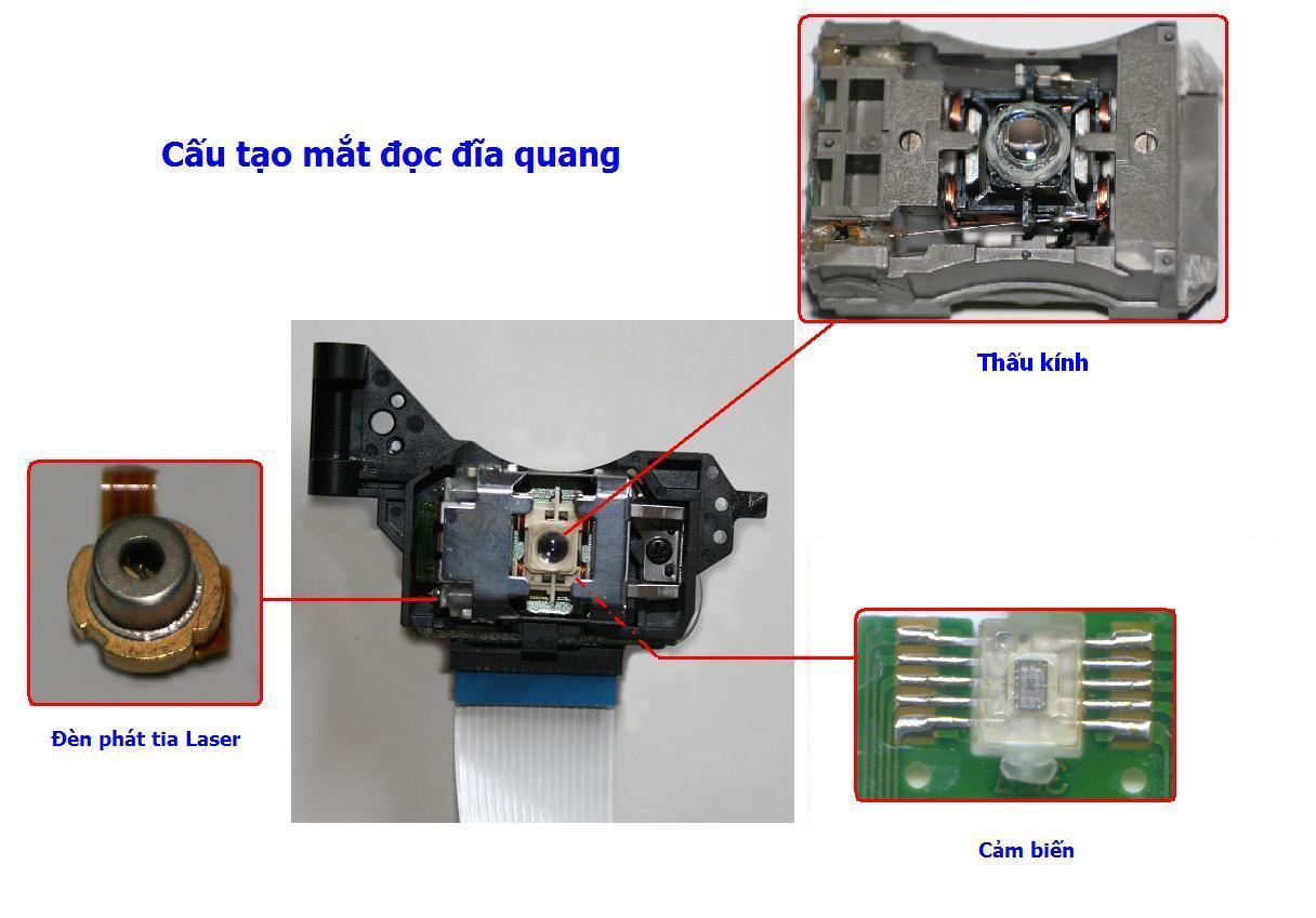 Mắt đọc và ghi đĩa quang của một ổ đĩa quang do hãng Asus sản xuất.